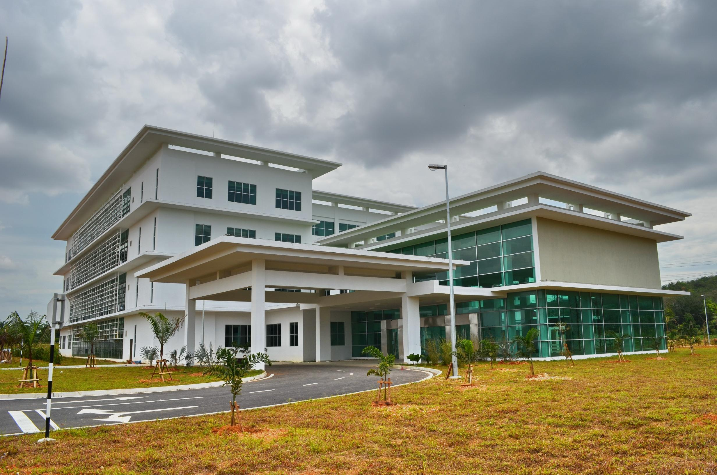 The Sultanah Zanariah Library (6)